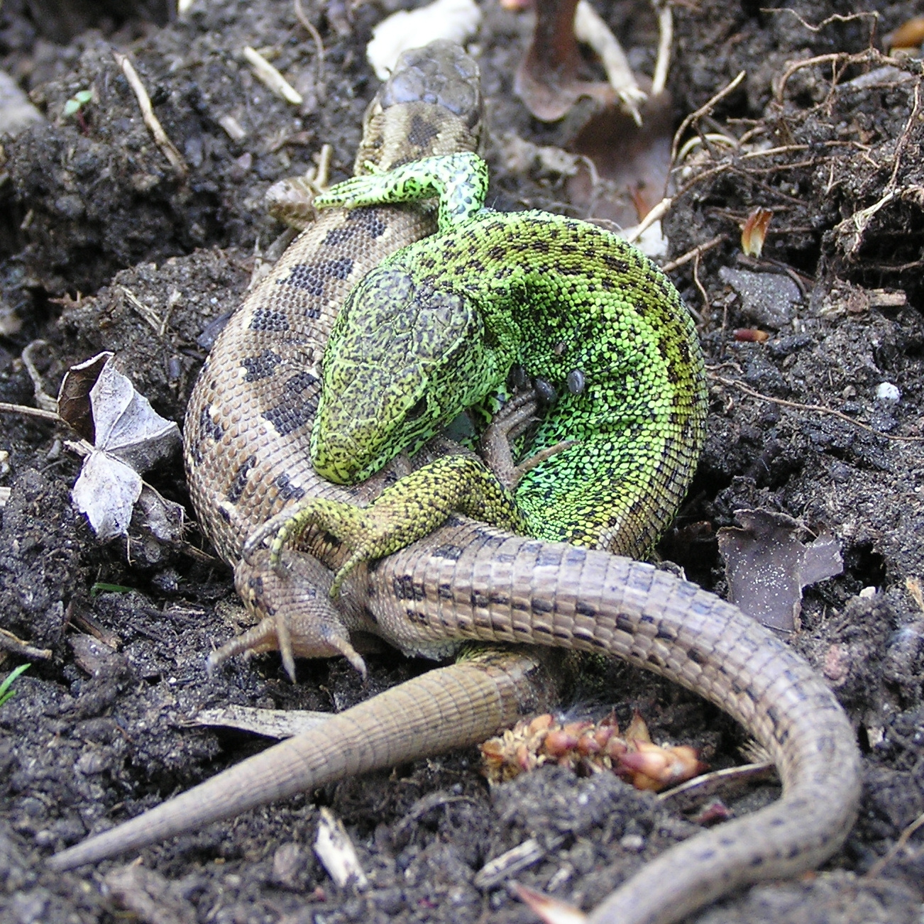 Zauneidechse (Lacerta agilis) bei der Paarung. Gut zu erkennen beim (grünen) Männchen der nachgewachsene Schwanz.